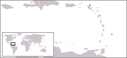 Locatie SSS-eilanden (bewerking van Locatie-Dominica) GFDL